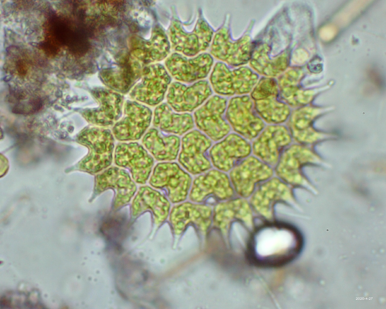 Pediastrum duplex Variation ohne große Zwischenräume